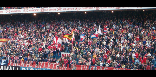 Afición del Atlético de Madrid